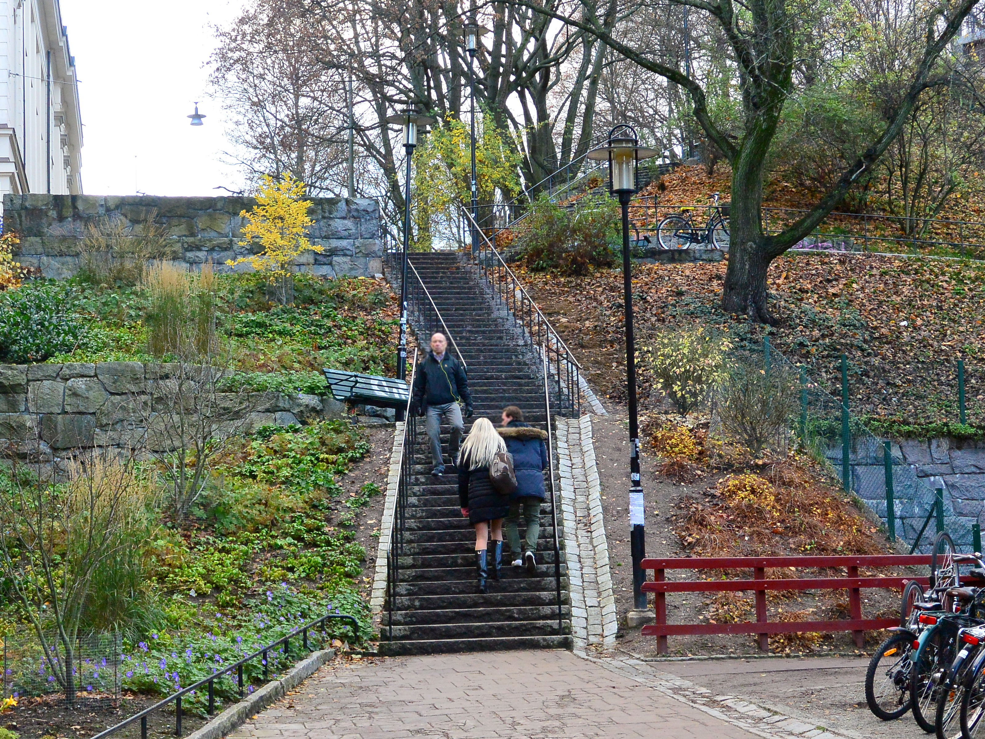 Kungstenstrappan, Norrmalm, Stockholm.